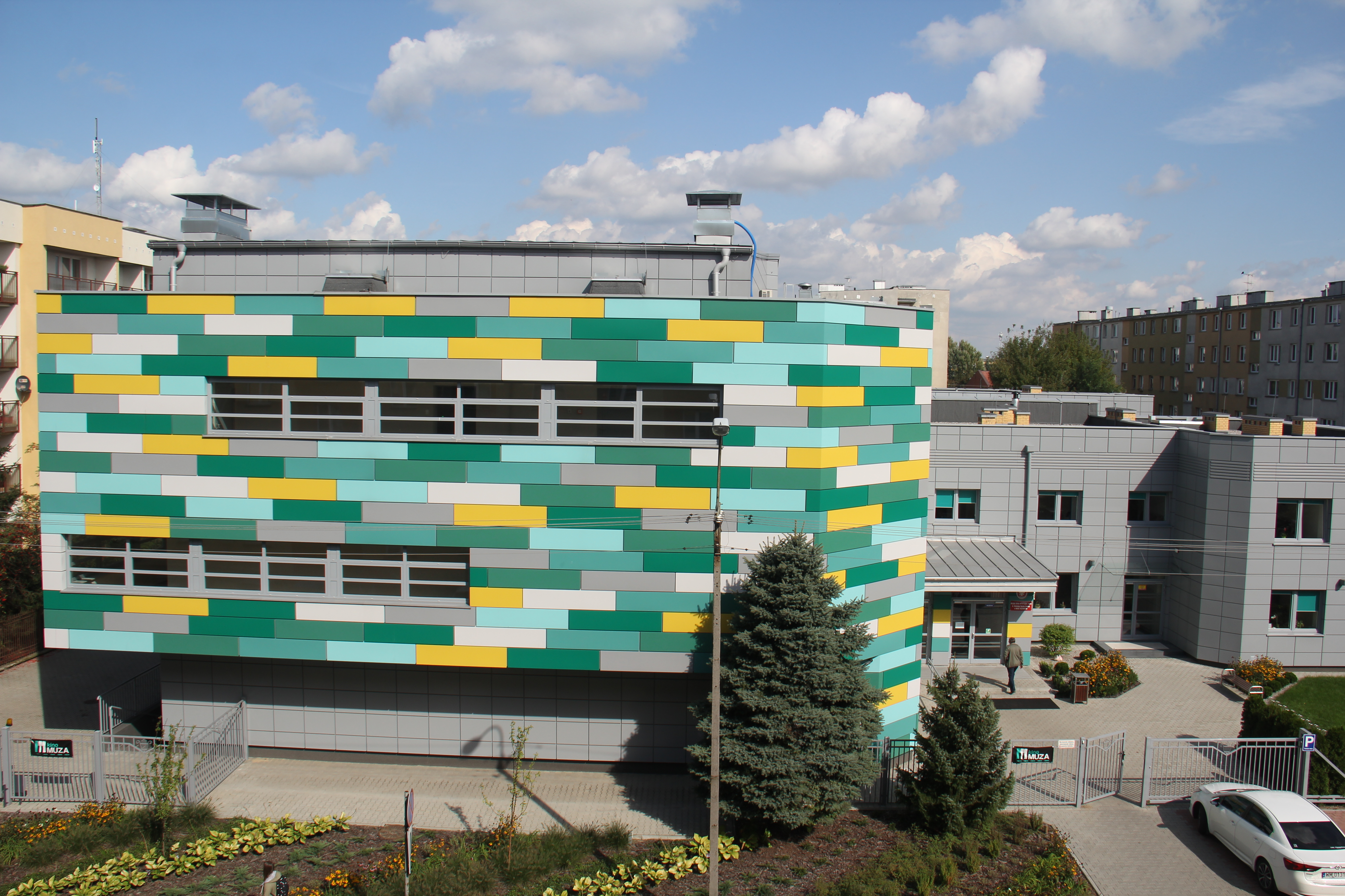 School of Artists in Mińsk Mazowiecki / Miejska Szkoła Artystyczna w Mińsku Mazowieckim